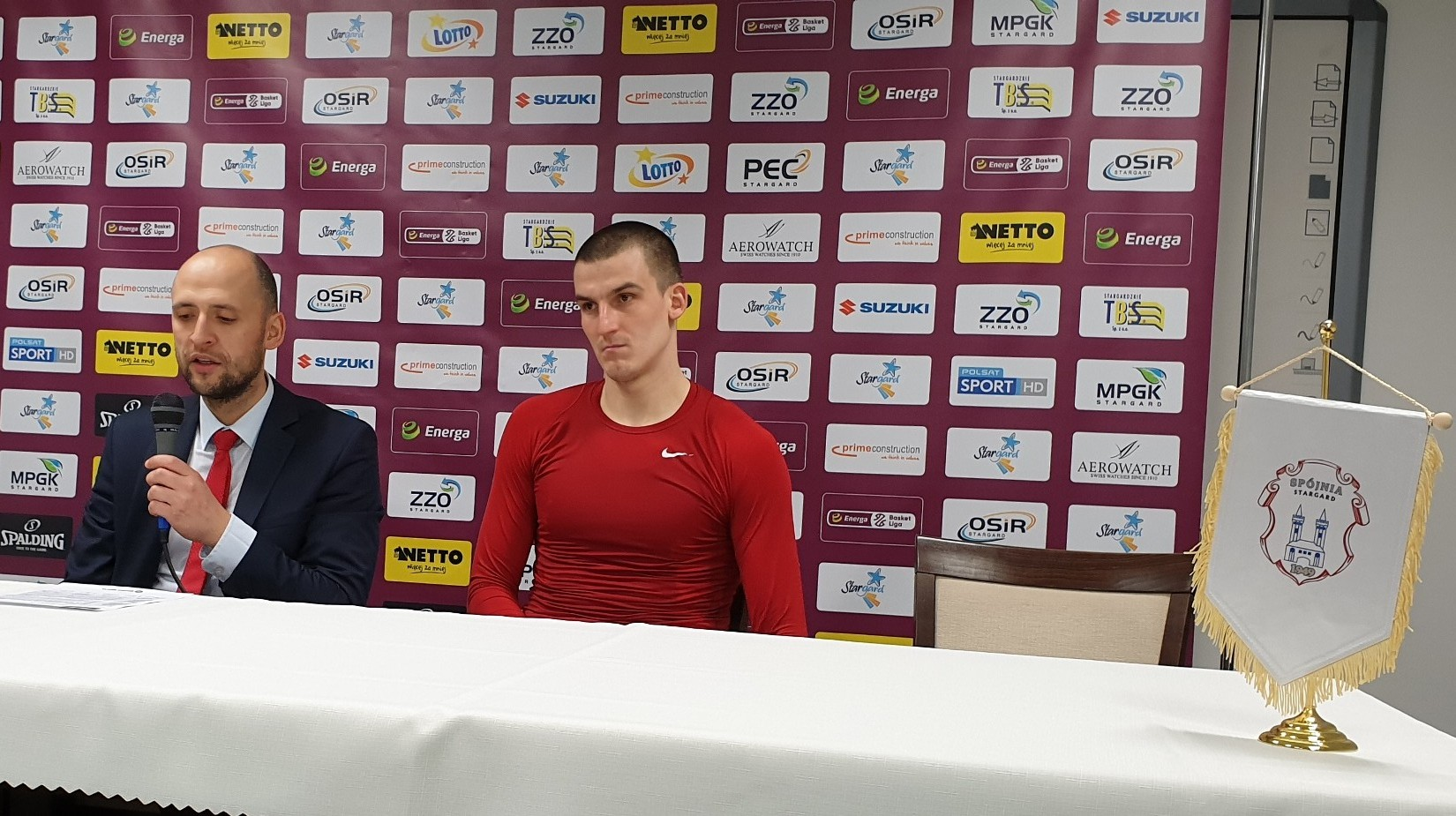 Konferencja prasowa Spójni - AZS